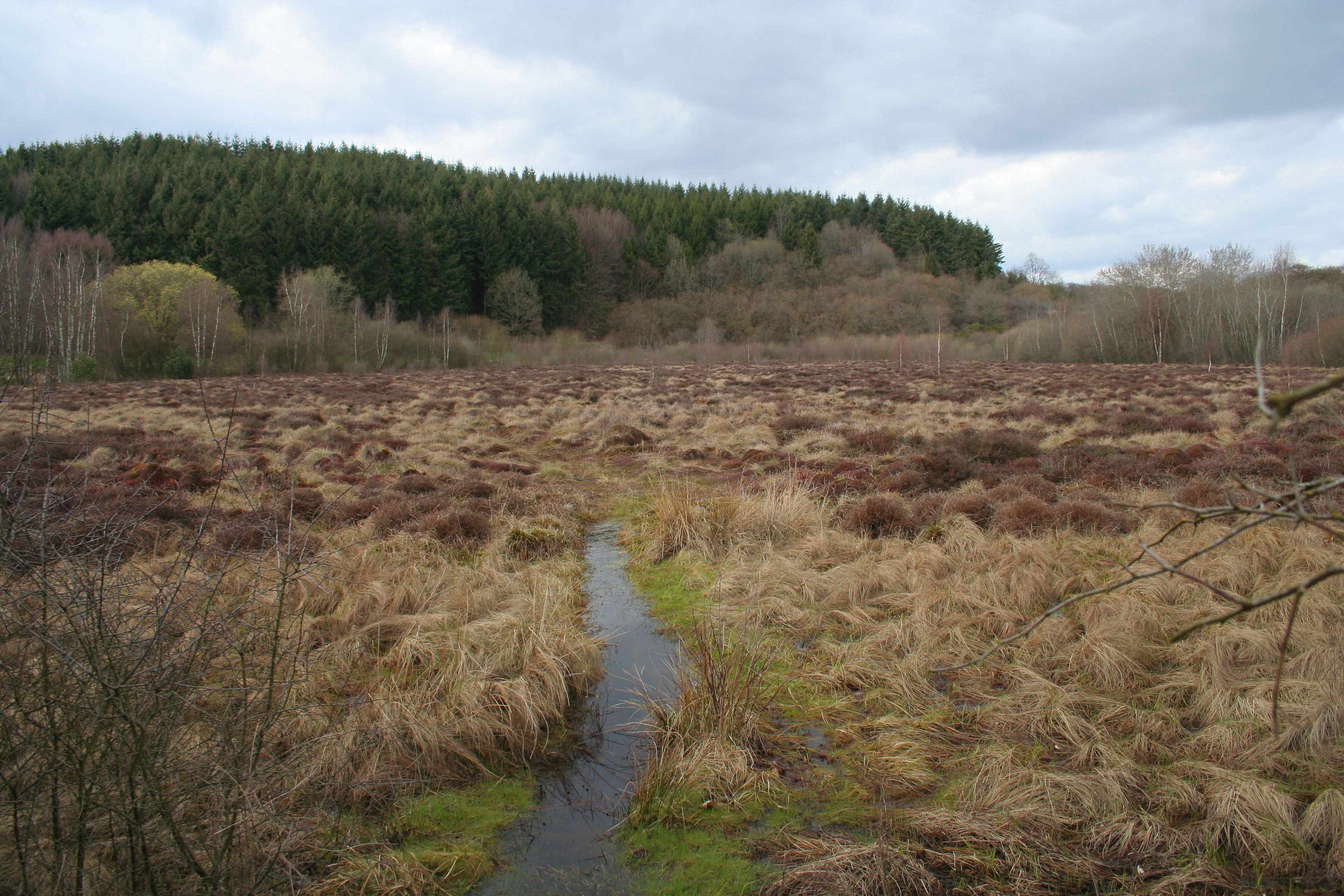 Strohner Märchen, ein verlandetes Maar in der Vulkaneifel